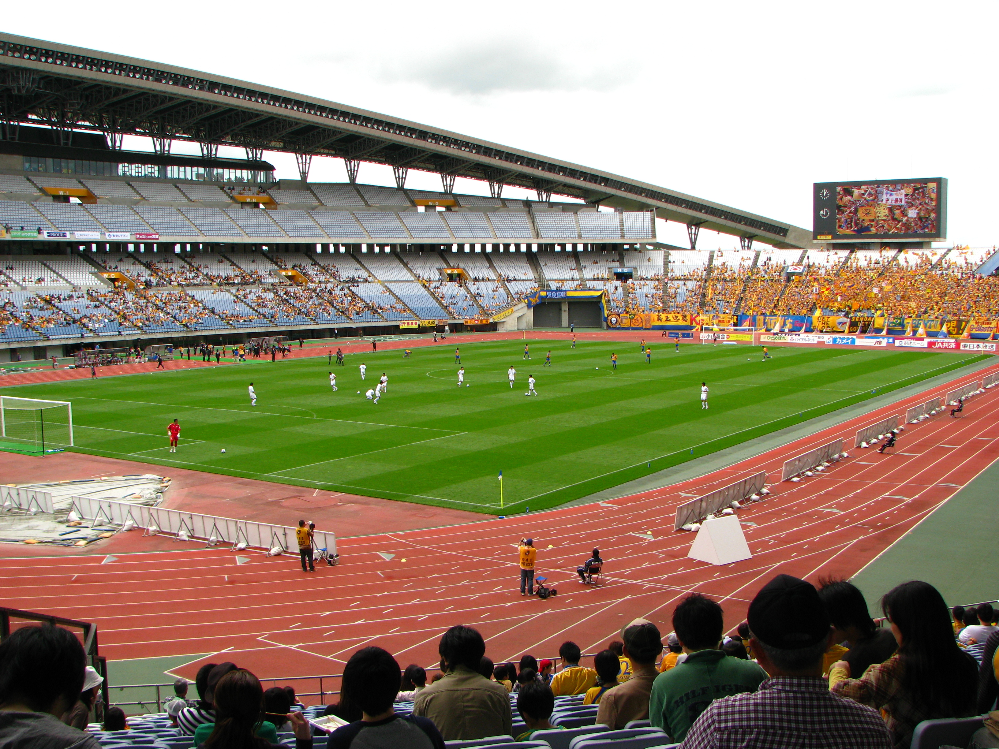 宮城県総合運動公園宮城スタジアムのフィールド部分です。